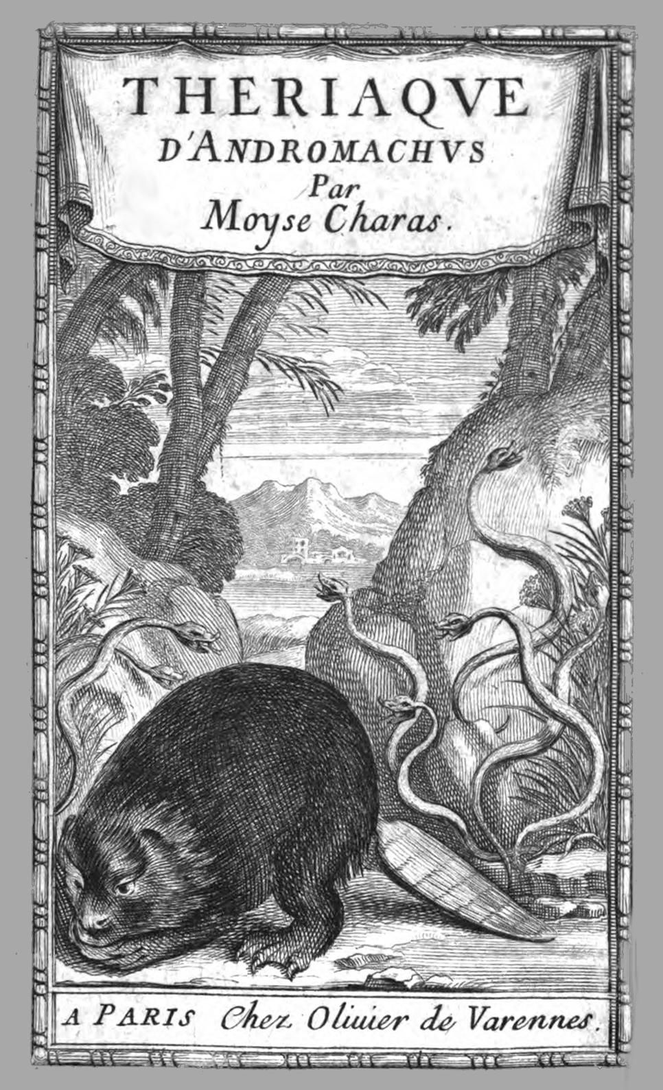 Titelkupfer